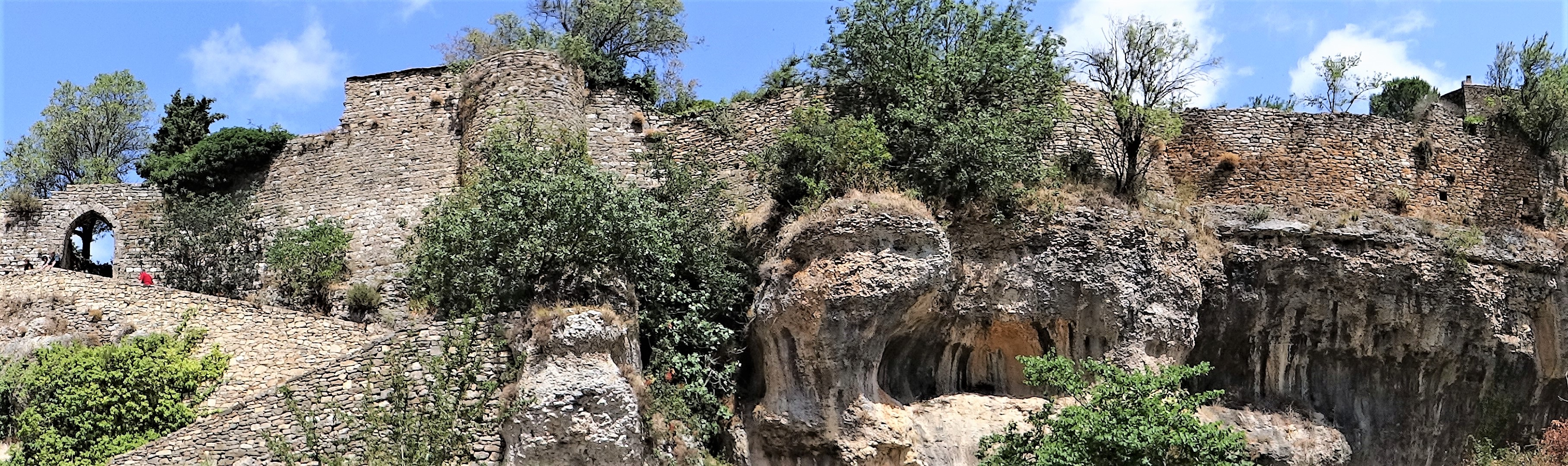 Minerve - Les remparts protégeant la porte sud. .